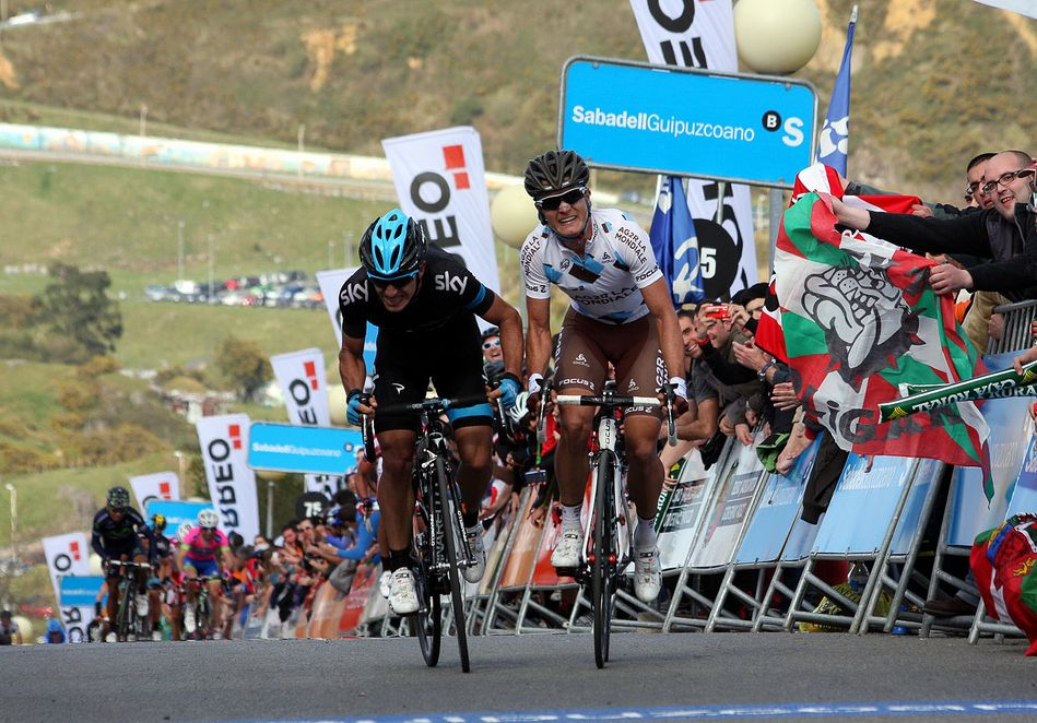 Final de la 3ª etapa. Sergio Henao se impone a Carlos Betancur